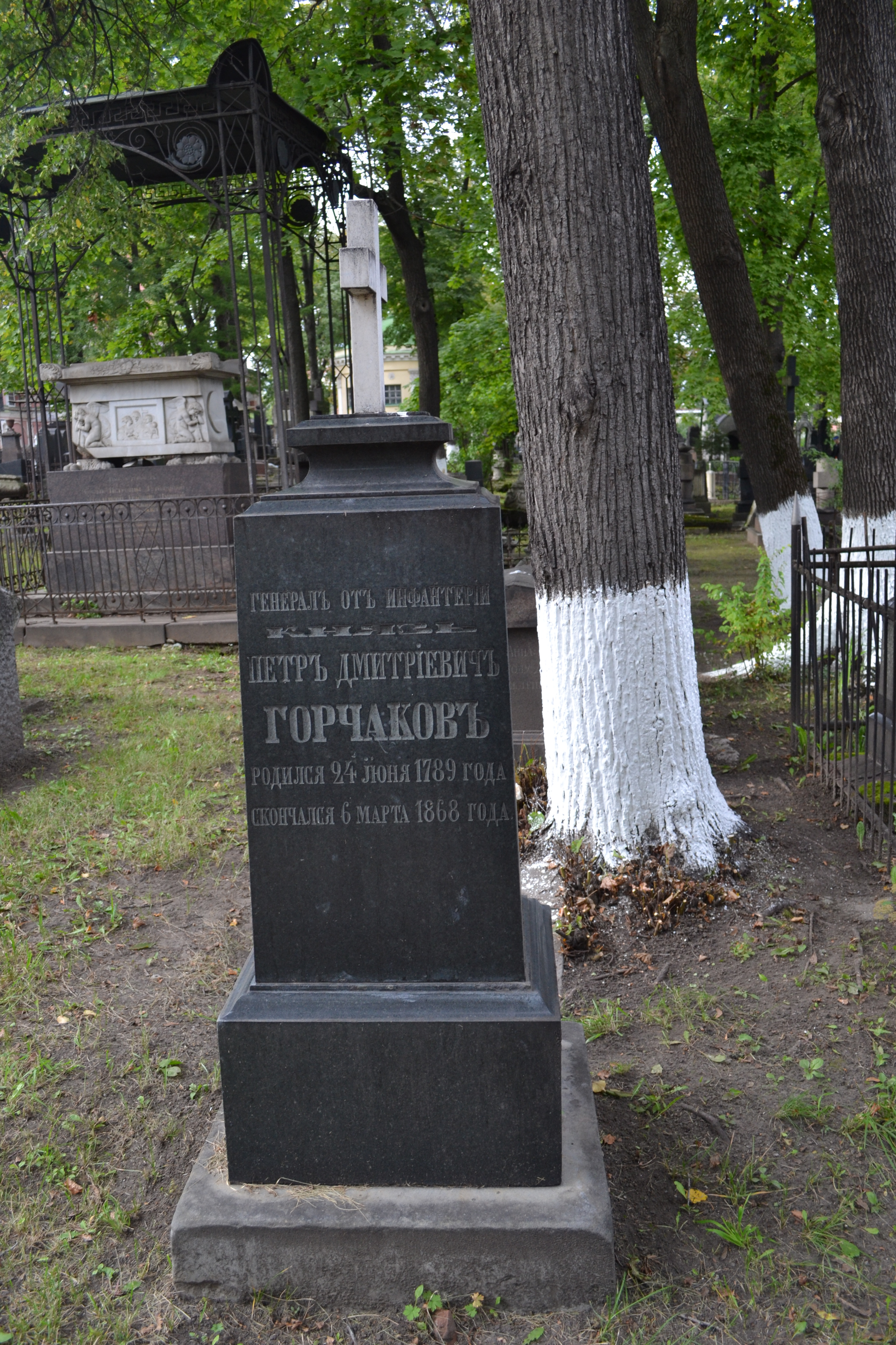 Пётр Дмитриевич Горчаков, могила в некрополе Донского монастыря